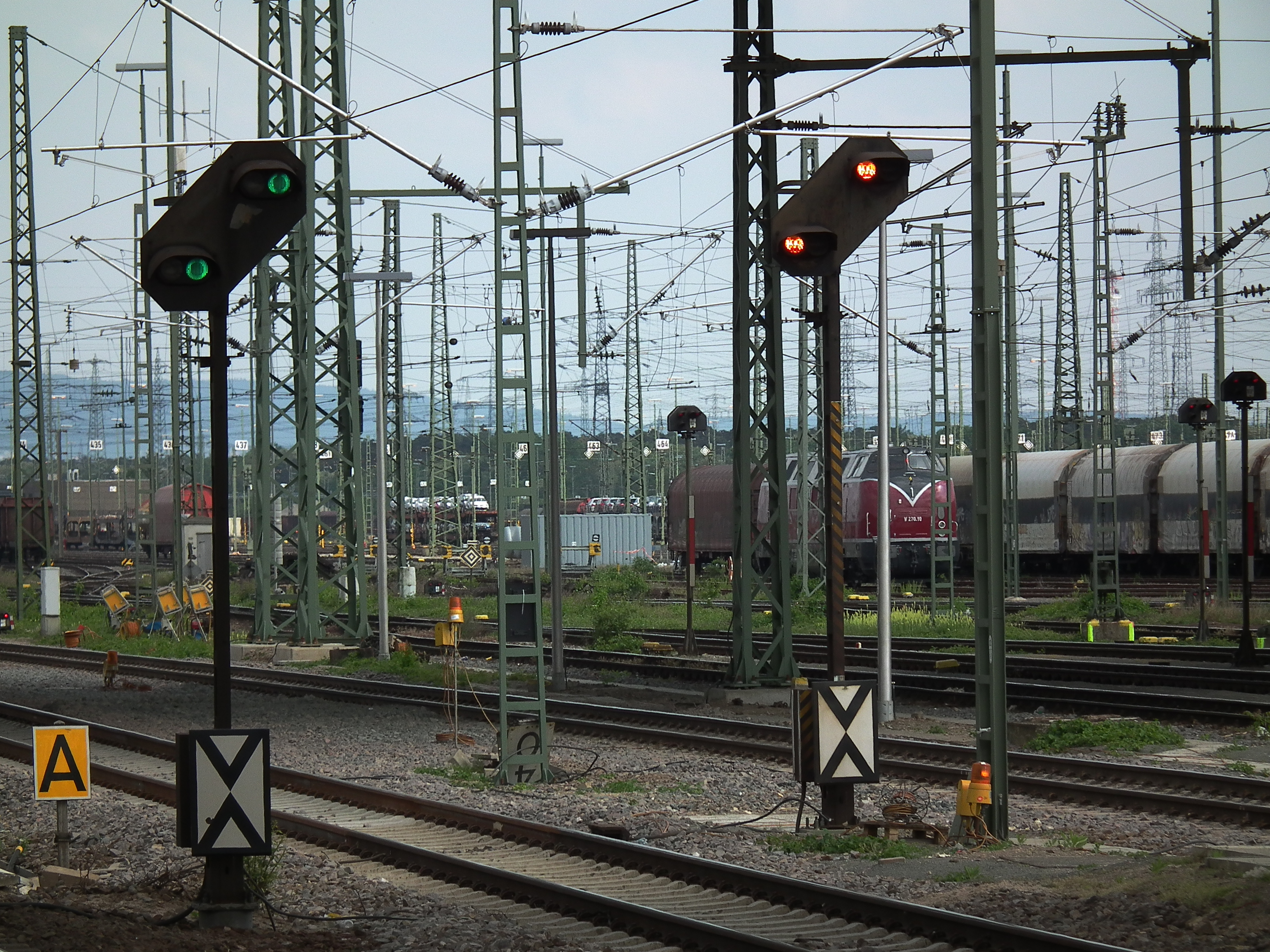 Blick vom Haltepunkt Mannheim Rangierbahnhof auf den Rangierbahnhof in Mannheim (Baden-Württemberg, Deutschland)